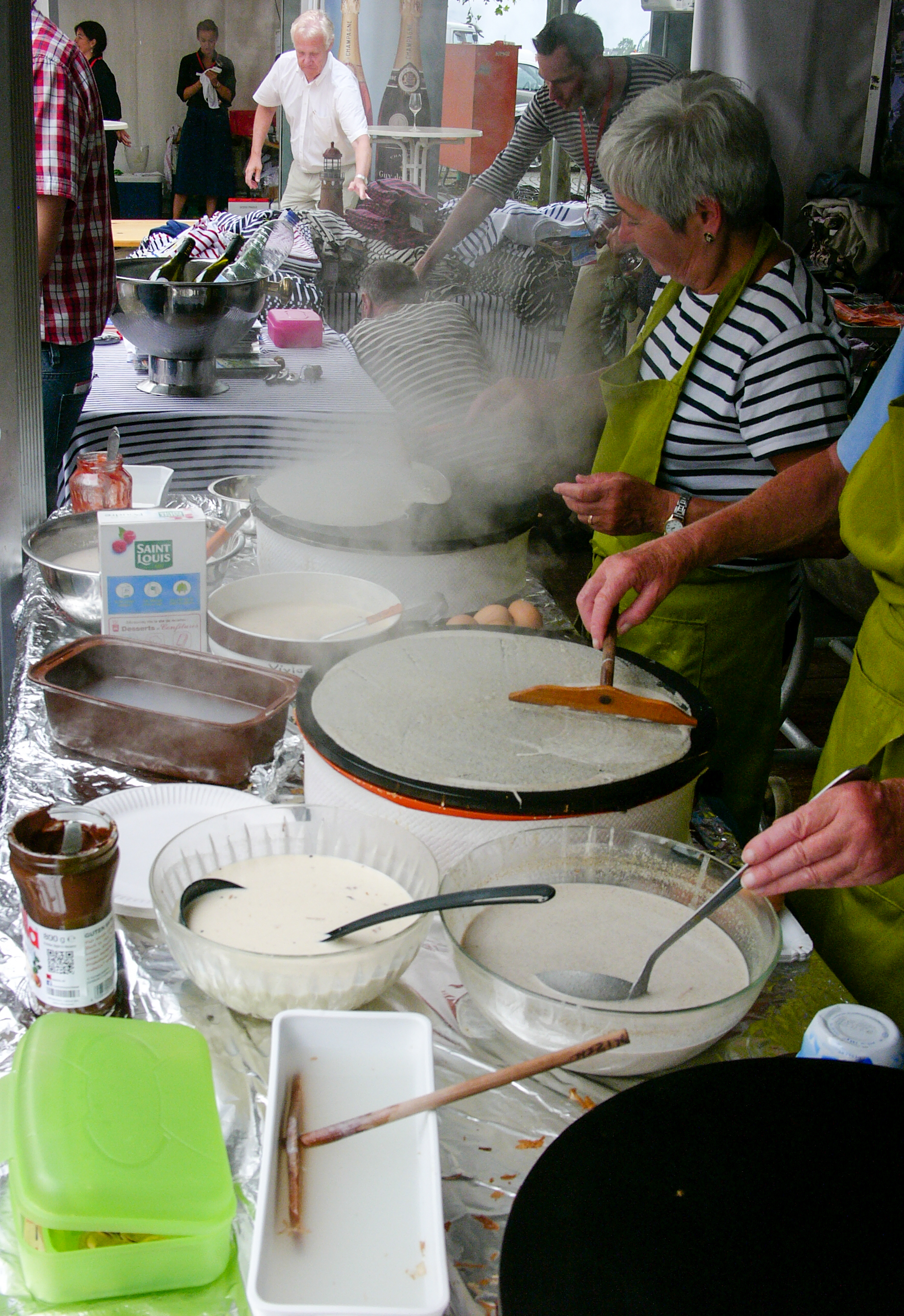 Zubereitung von Crepes auf dem Frankreichfest in Düsseldorf